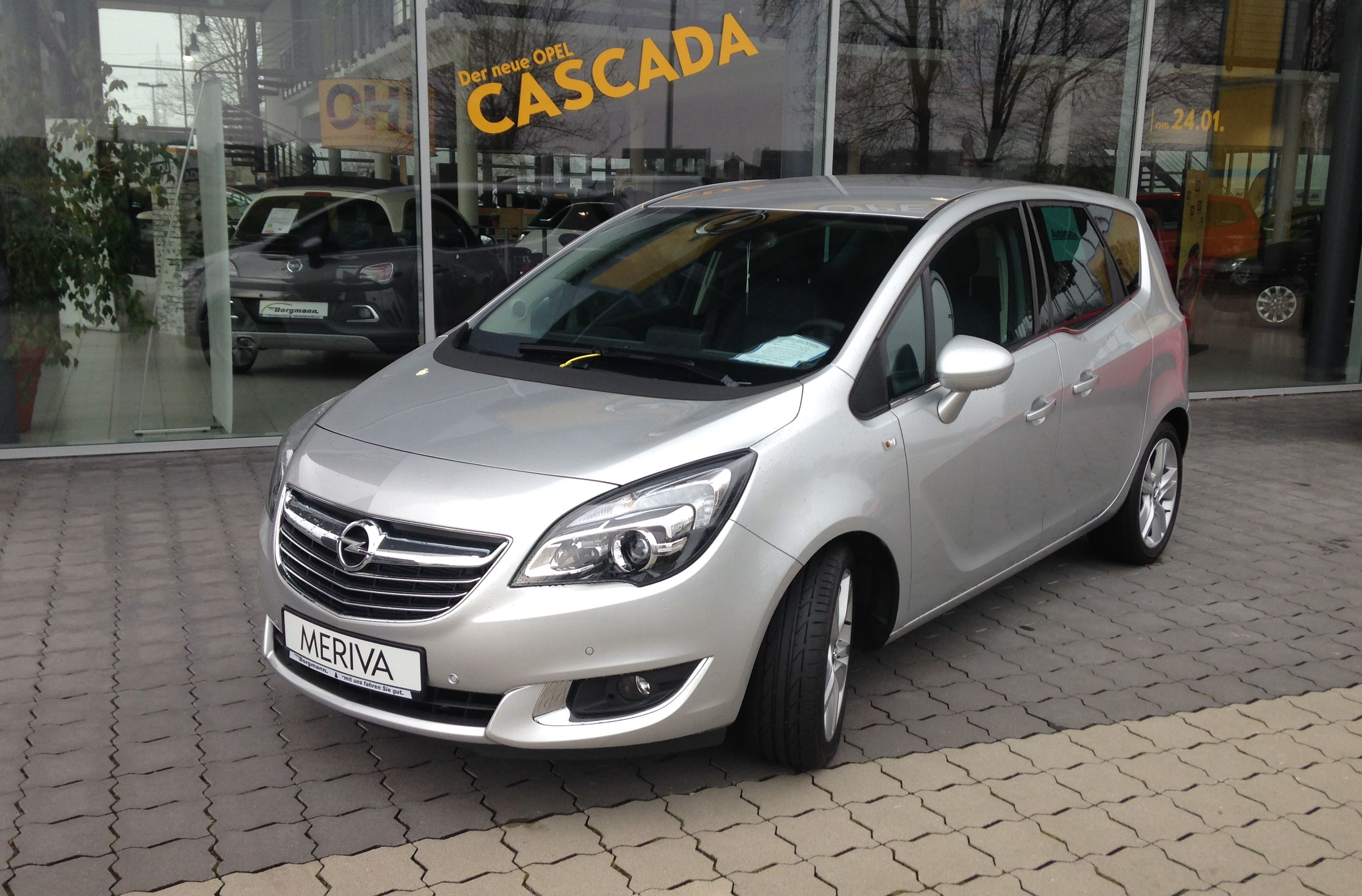 Opel Meriva Facelift (Baureihe "B") - Front